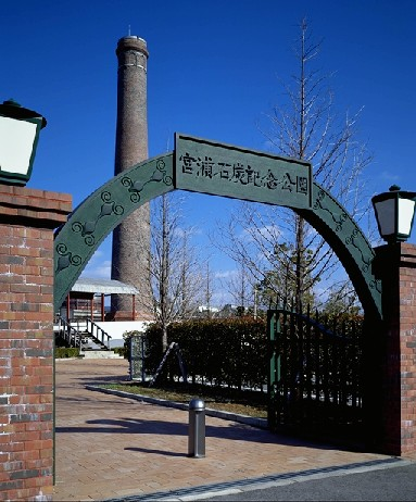 三池炭鉱宮浦坑跡を公園化した宮浦石炭記念公園です。れんが煙突は国の登録文化財となっています。大斜坑の坑口や人車ホームが残されており、人車、坑内機械類が展示されています。